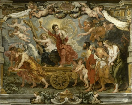 Le Triomphe de la foi catholique de Pierre Paul Rubens, 1e moitié du 17e siècle, huile sur toile, 594 x 474 cm, Valenciennes, musée des Beaux-Arts, France.